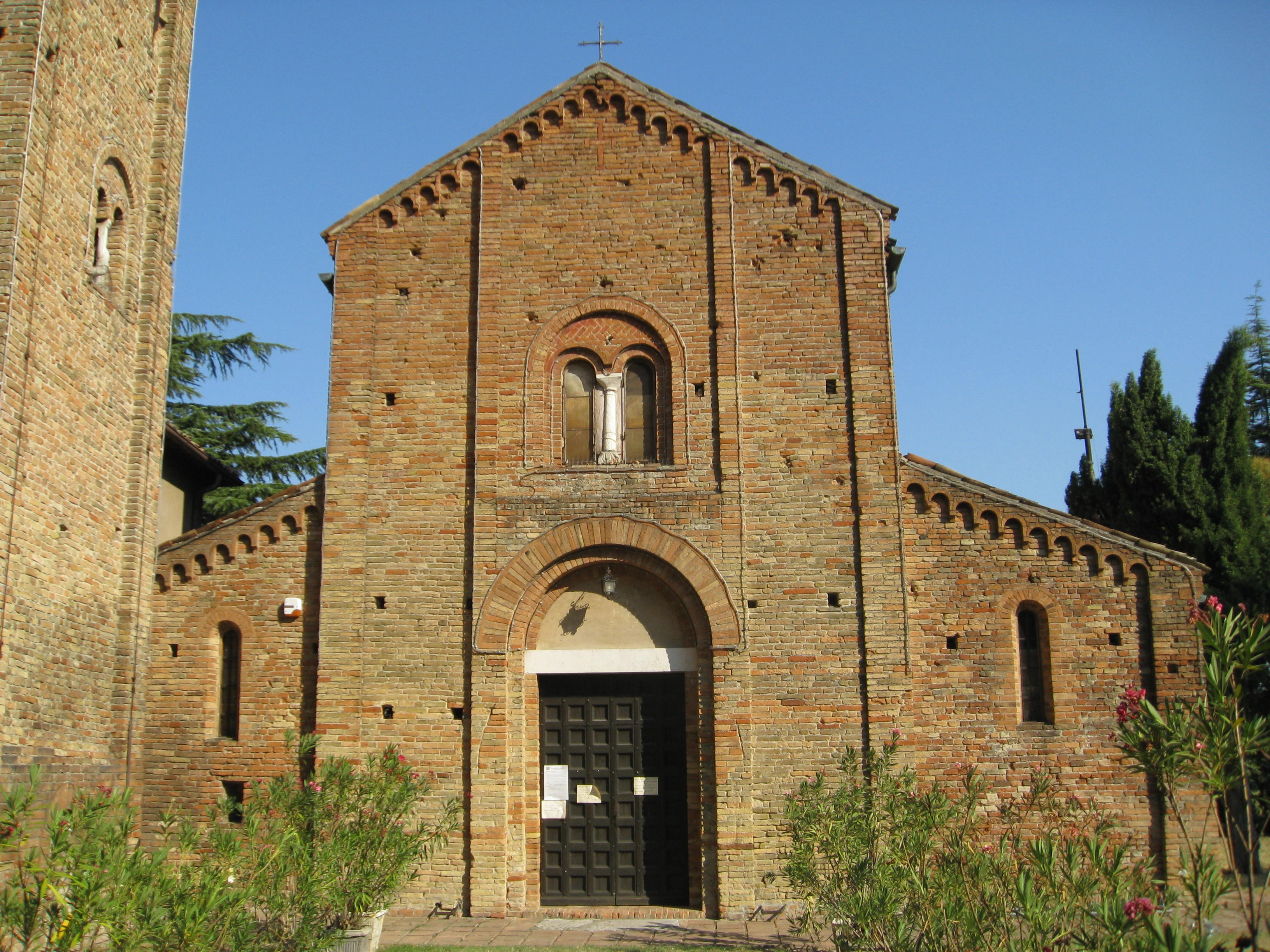 Facciata della pieve di Santa Maria in acquedotto, foto propria